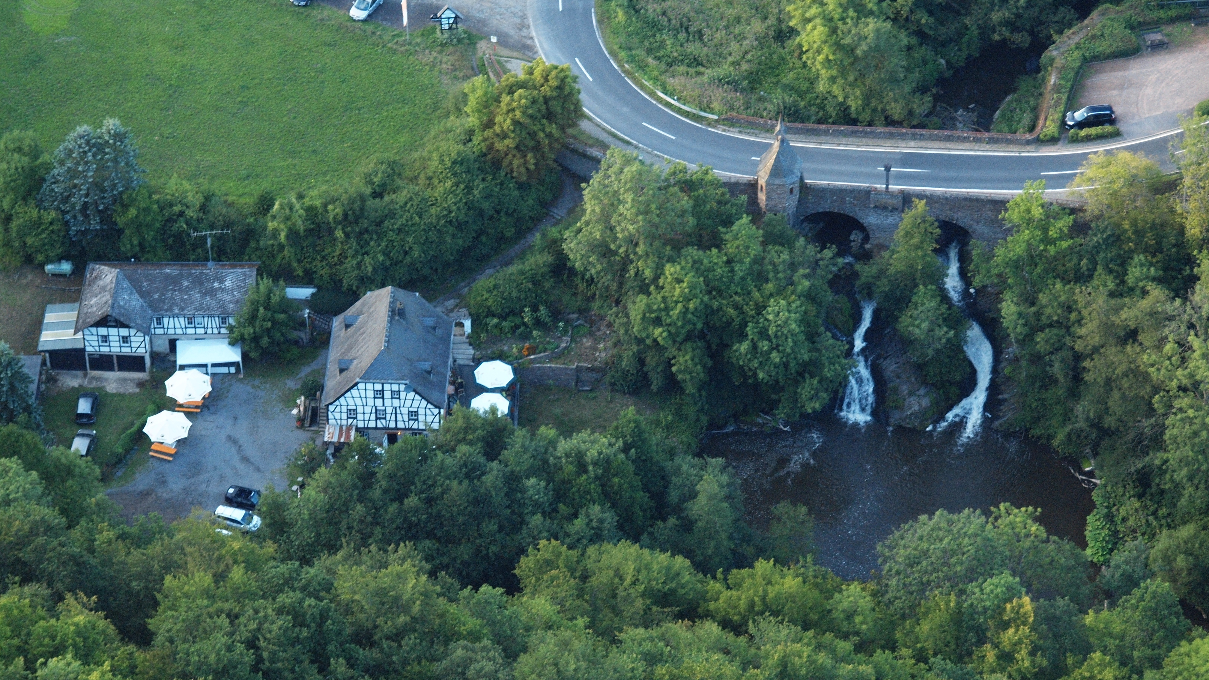 Pyrmonter Mühle am Elzbachfall, Luftaufnahme (2015)